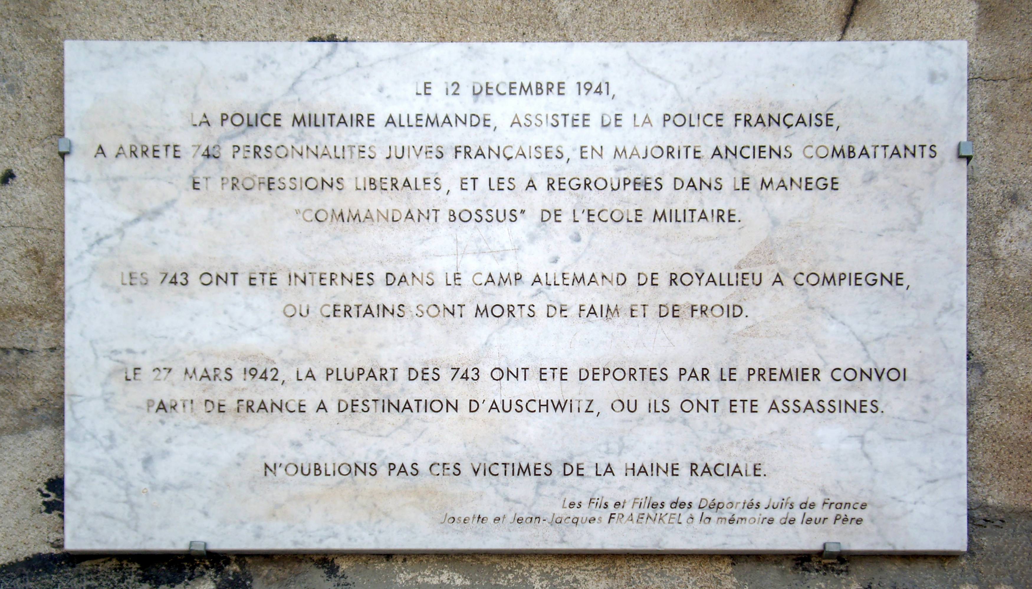 Plaque apposée place de l'École-Militaire, Paris 7e.Le 12 décembre 1941, la police militaire allemande, assistée de la police française, a arrêté 743 personnalités juives françaises, en majorité anciens combattants et professions libérales, et les a regroupées dans le manège « Commandant Bossus » de l'École militaire. Les 743 ont été internés dans le camp allemand de Royallieu à Compiègne, où certains sont morts de faim et de froid. Le 27 mars 1942, la plupart des 743 ont été déportés par le premier convoi parti de France à destination d'Auschwitz, où ils ont été assassinés. N'oublions pas ces victimes de la haine raciale.Les Fils et Filles des Déportés Juifs de FranceJosette et Jean-Jacques Fraenkel à la mémoire de leur Père